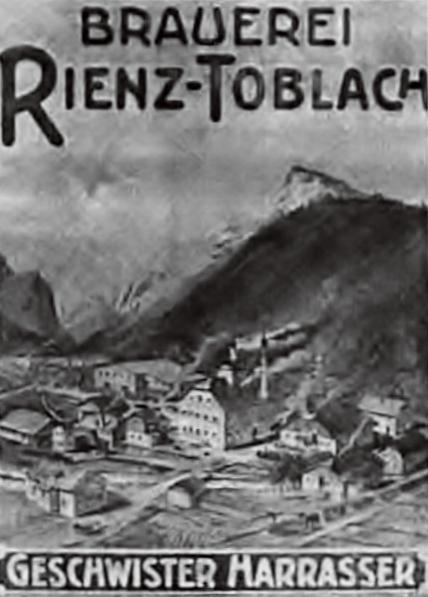 Fabbrica birra Dobbiaco